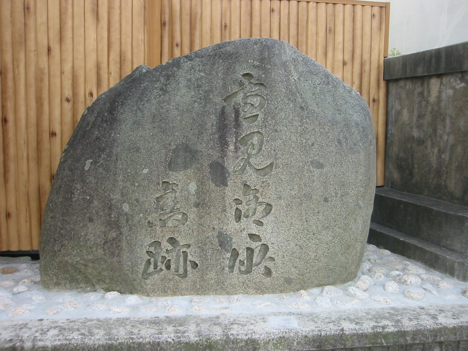 2005年、投稿者自身による撮影。福原 雪見御所旧跡